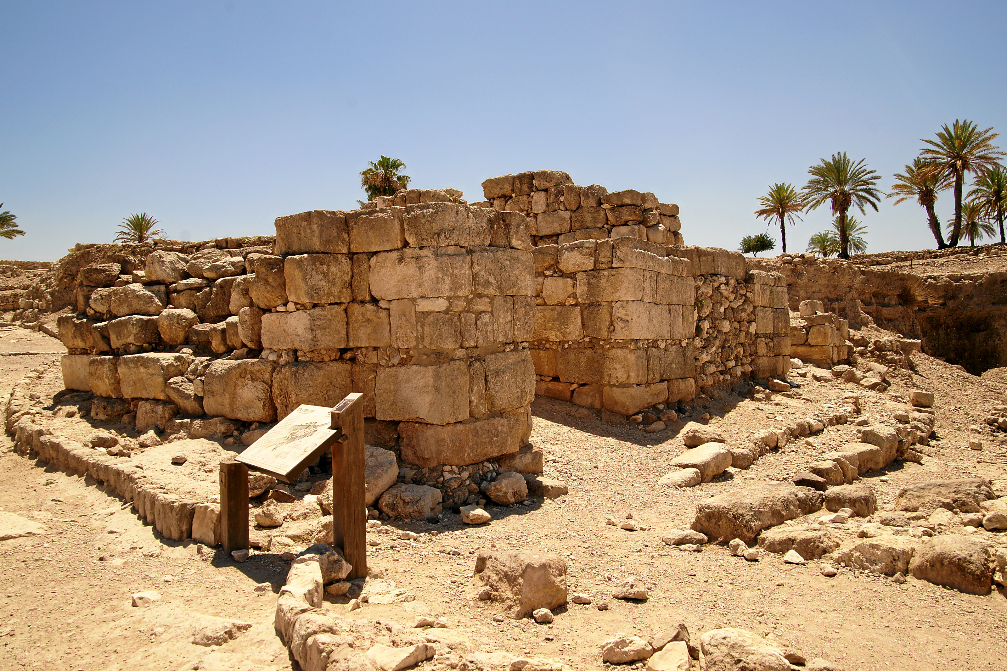 Tel Megiddo: salomonisches Stadttor